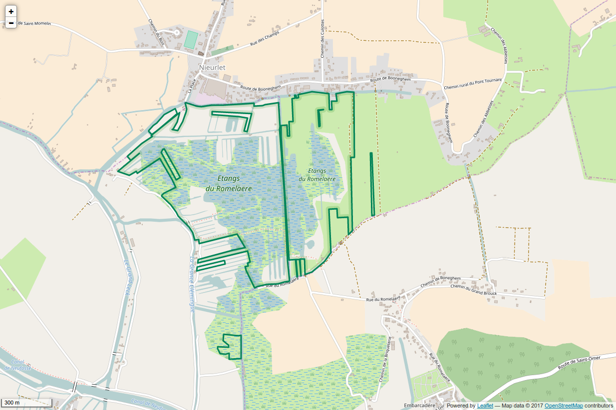 Périmètre de la RNN des Etangs du Romelaëre.